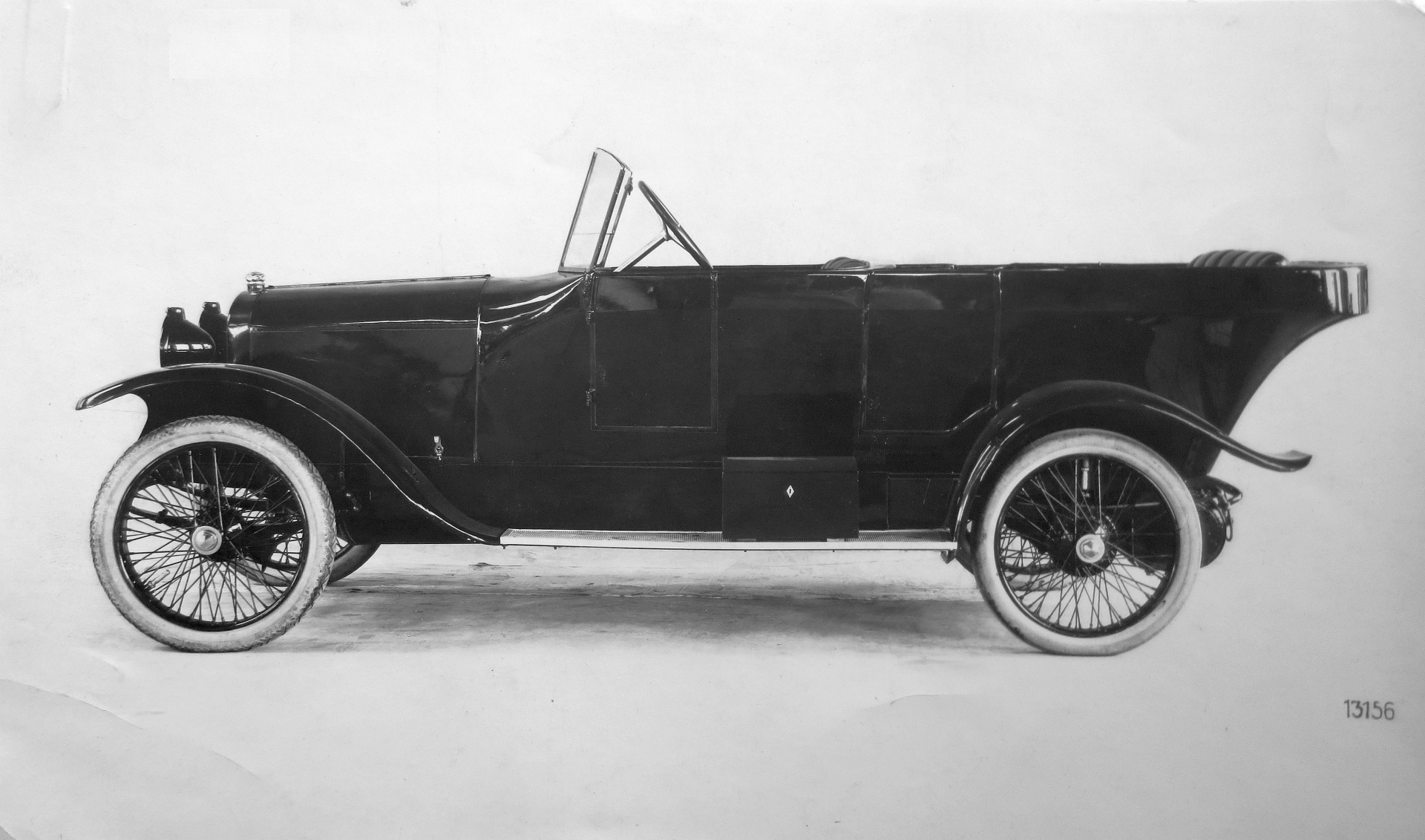 Automobil Walter W-II (1914)